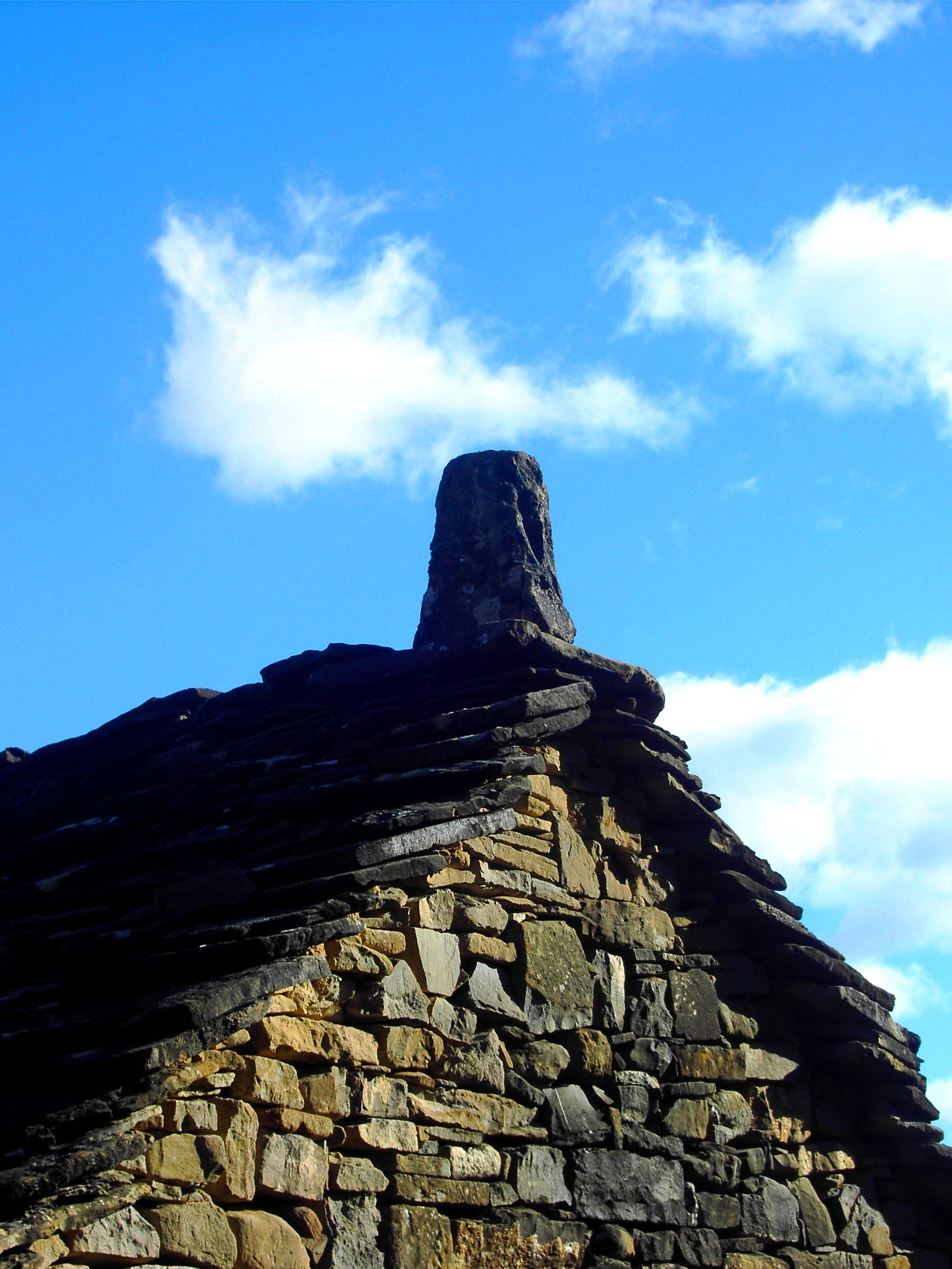 Aragonés: Pirol, en a valle de Vió